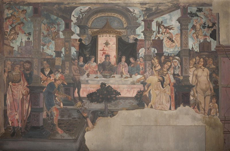 Fragment van Banket en straf van Tantalus. Fresco toegeschreven aan Jan van Roome, ca. 1515 (eerder aan Jan Mabuse). Foto van een kopie door Barth(olomeus) Verschaeren (1938) naar Alexandre Hannotiaux (1901) Banket en straf van Tantalus (kopie van de muurschildering) Object number: 161678 Type of object: schilderij Inventory number: nv. S0006 Institution place: Mechelen[deelgemeente] Institution: Museum Hof van Busleyden